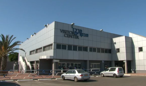 מרכז המבקרים של נמל אשדוד